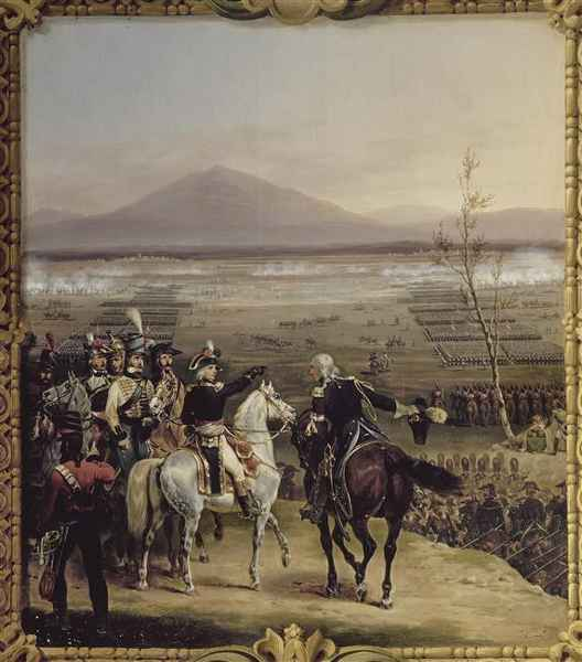 Passage du Tagliamento à Valvasone, 16 mars 1797.